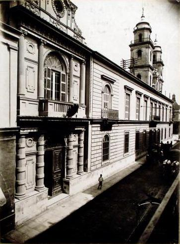 Vista hacia el norte de la calle Bolívar. Se ve, de izquierda a derecha: el pórtico de acceso al Colegio Nacional de Buenos Aires, seguido por las ventanas de sus aulas, y al fondo las dos torres de la Iglesia de San Ignacio. Al fondo se ve, muy pequeña, la cúpula del Palacio Municipal inaugurado en 1891. Este antiguo edificio educativo, heredado de la orden jesuita, sería demolido a partir de 1910 para dar lugar al actual, de estilo academicista francés.